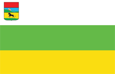 Прапор Старобільського району